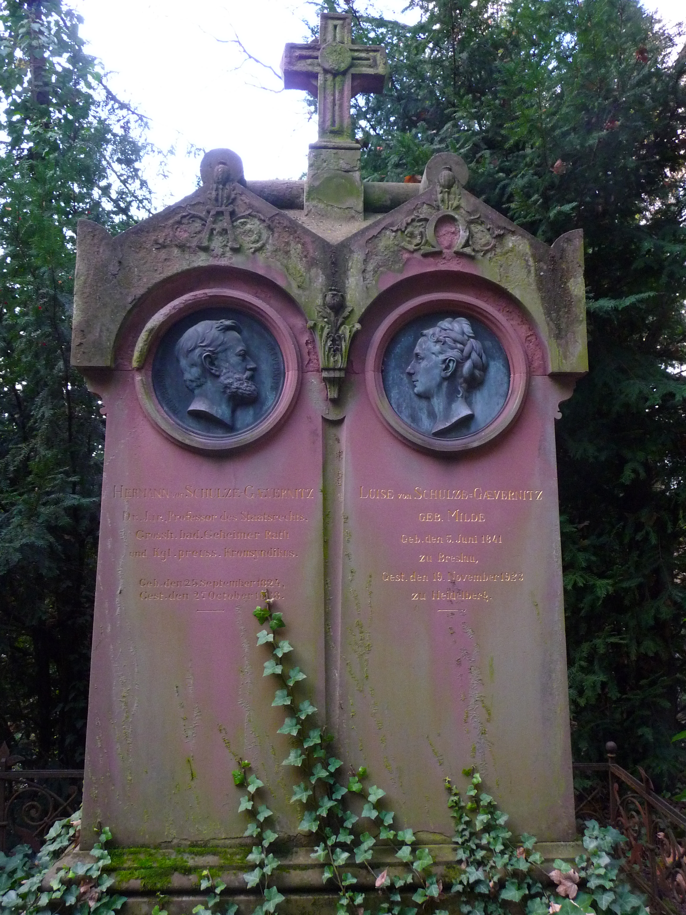 Grabstätte von Hermann von Schulze-Gaevernitz (23. September 1824 - 27. Oktober 1888) und seiner Ehefrau Luise von Schulze-Gaevernitz, geb. Milde (15. Juni 1841 - 19. November 1923), fotografiert auf dem Bergfriedhof in Heidelberg (Baden-Württemberg, Deutschland)